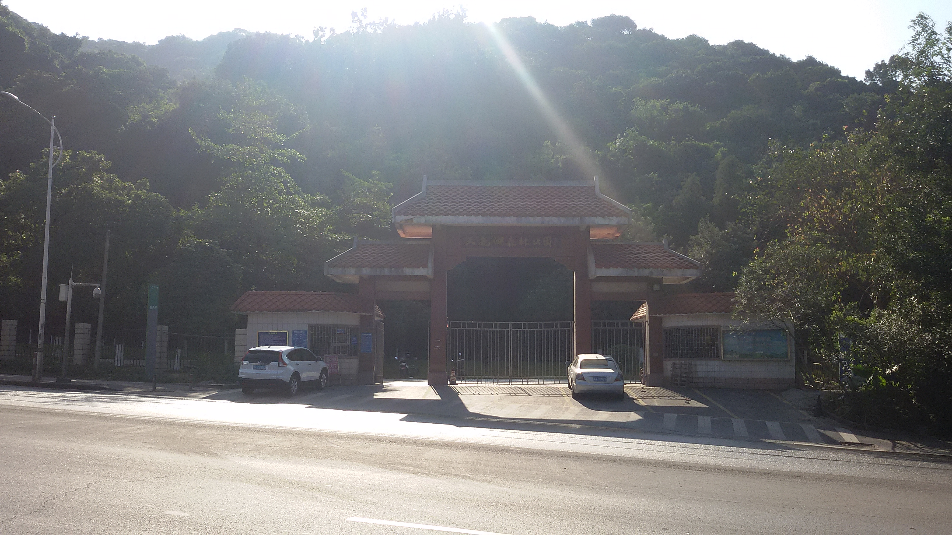 粵語: 天鹿湖森林公園